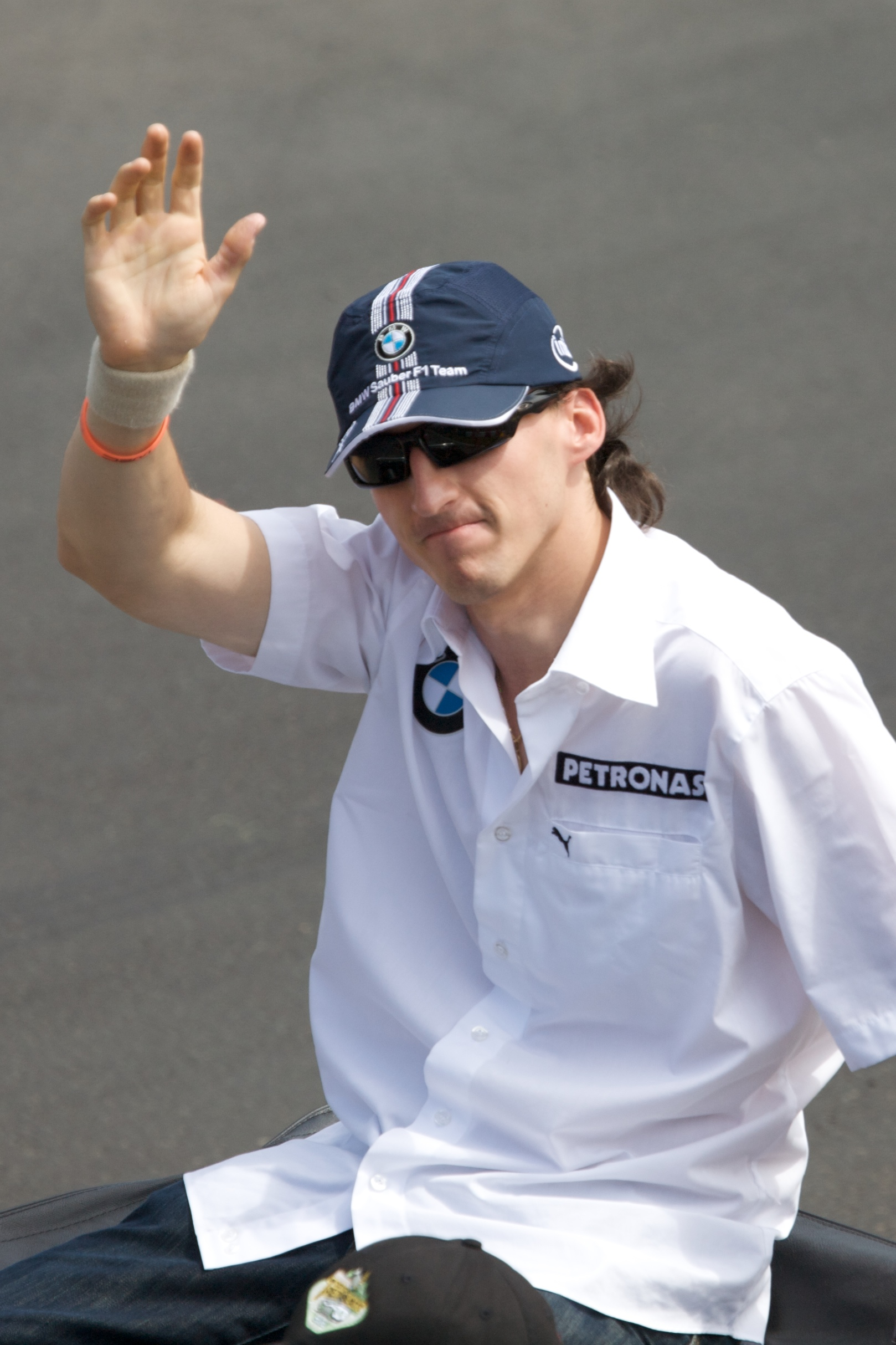 Robert Kubica at the 2008 Canadian Grand Prix. Robert Kubica au Grand Prix de Formule 1 du Canada en 2008 .